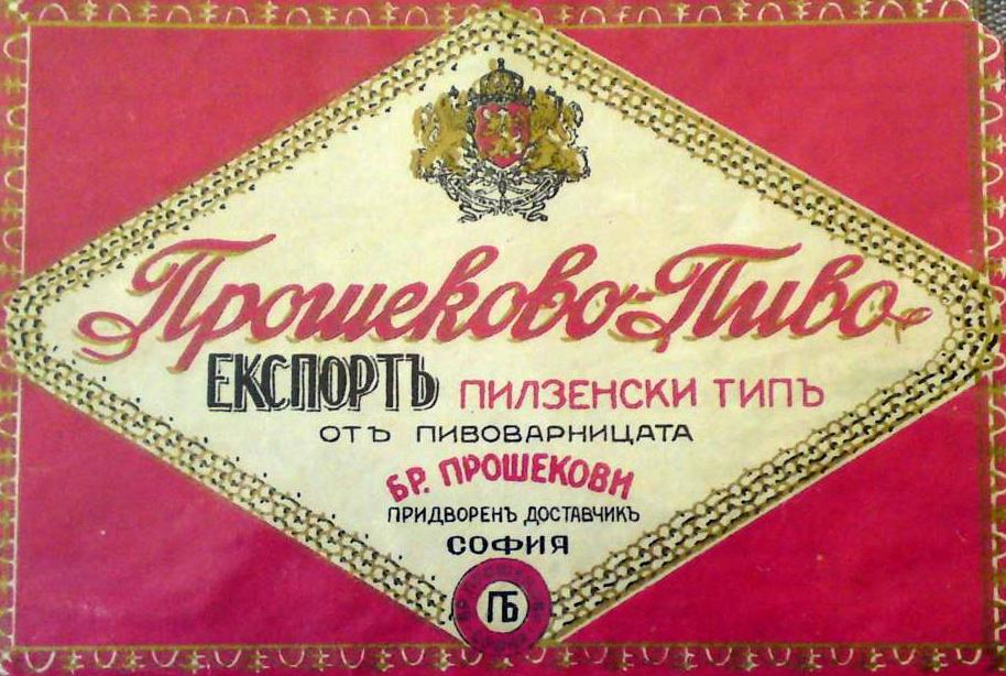 Етикет на Прошеково пиво